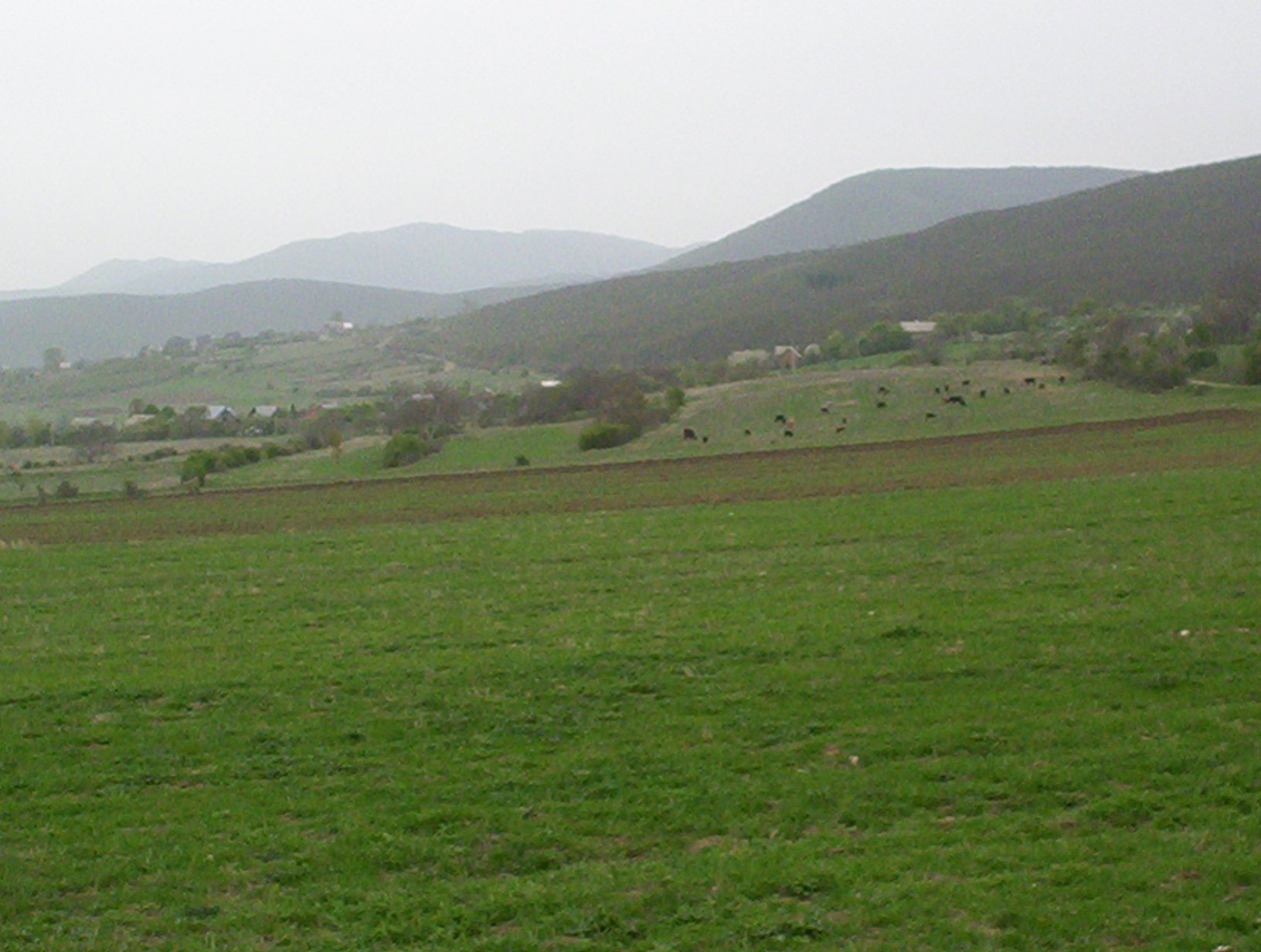 Trialeti